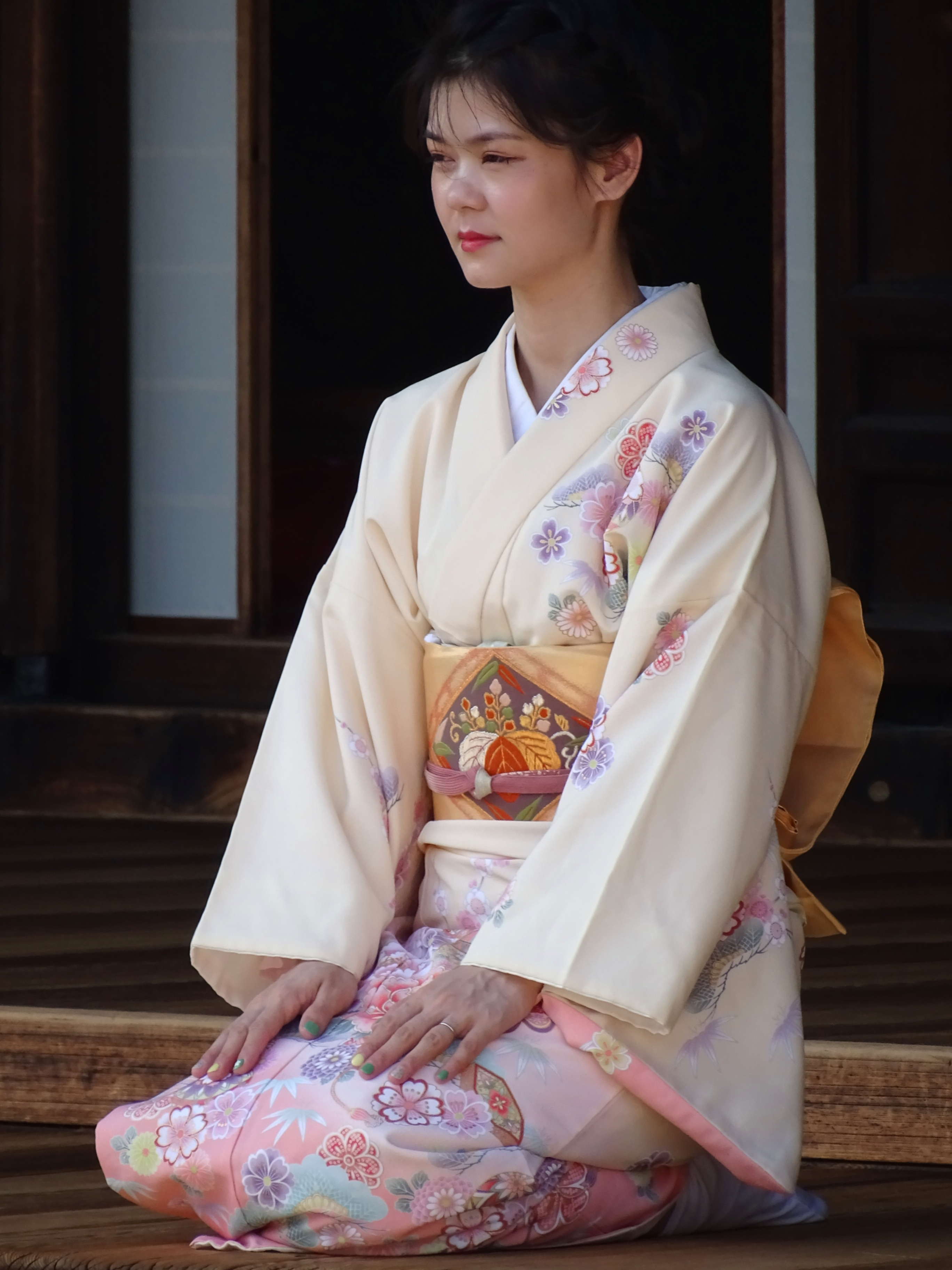 Young Woman at Kennin-ji Zen Temple - Kyoto - Japan - 01